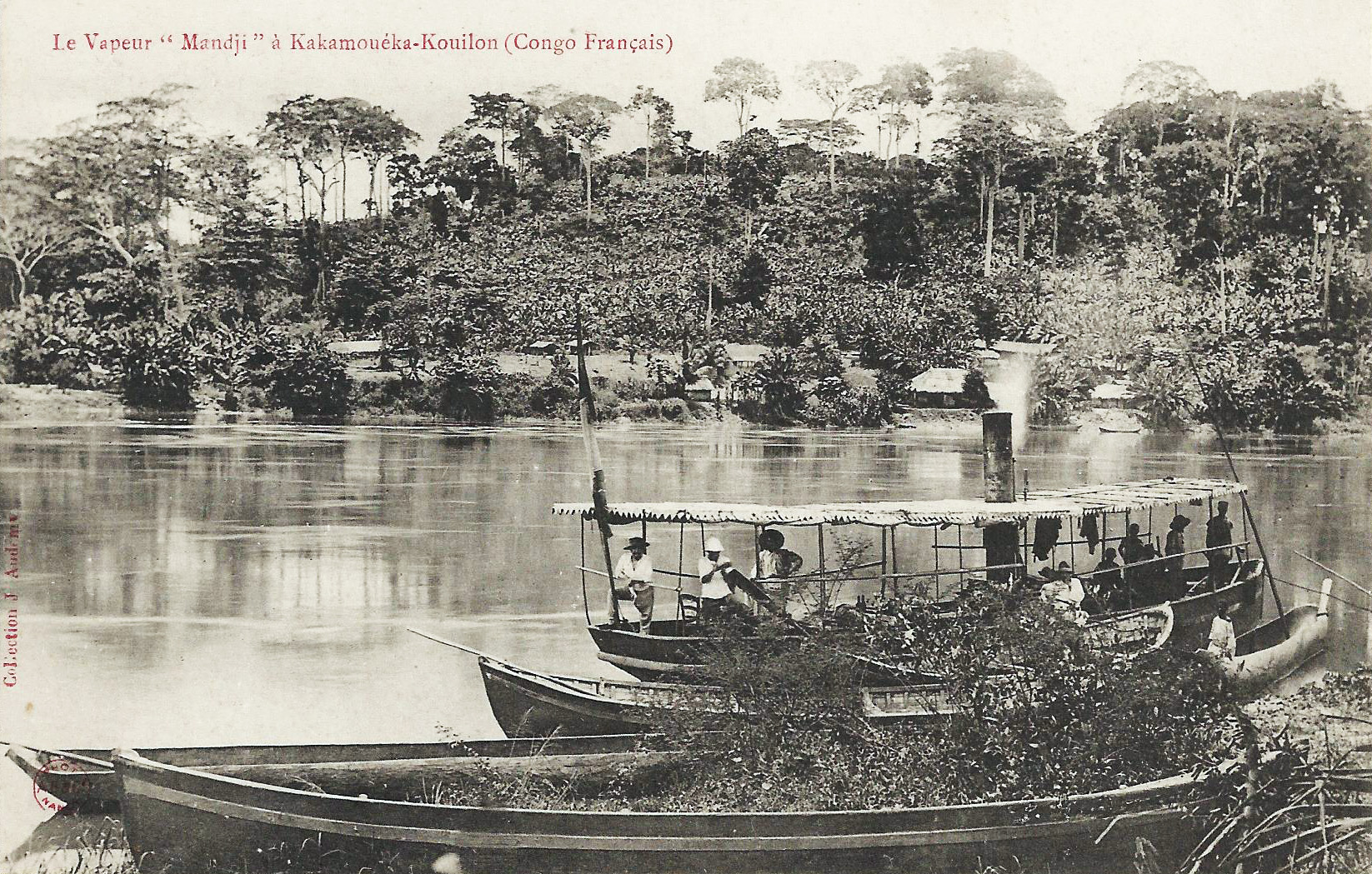 Le vapeur Mandji à Karamouéka-Kouilon. Collection J. Audema. Phot. A.B. & Cie, Nancy [Albert Bergeret] Congo Français